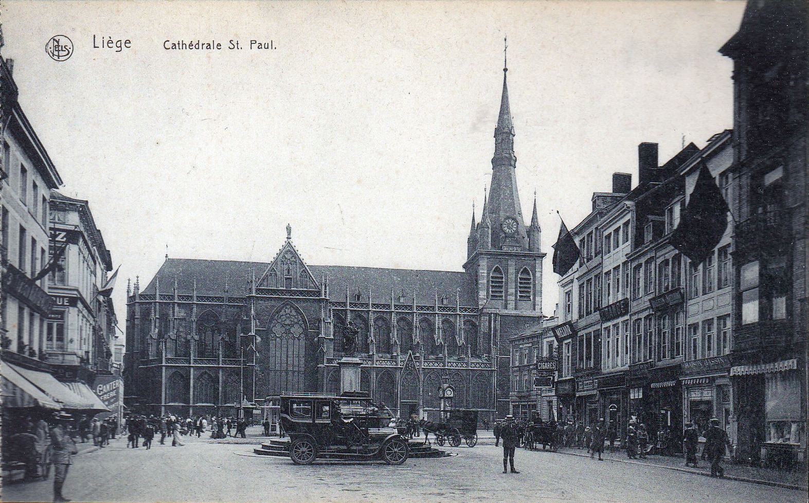 Cathédrale Saint-Paul, Liège - début 20ème siècle.